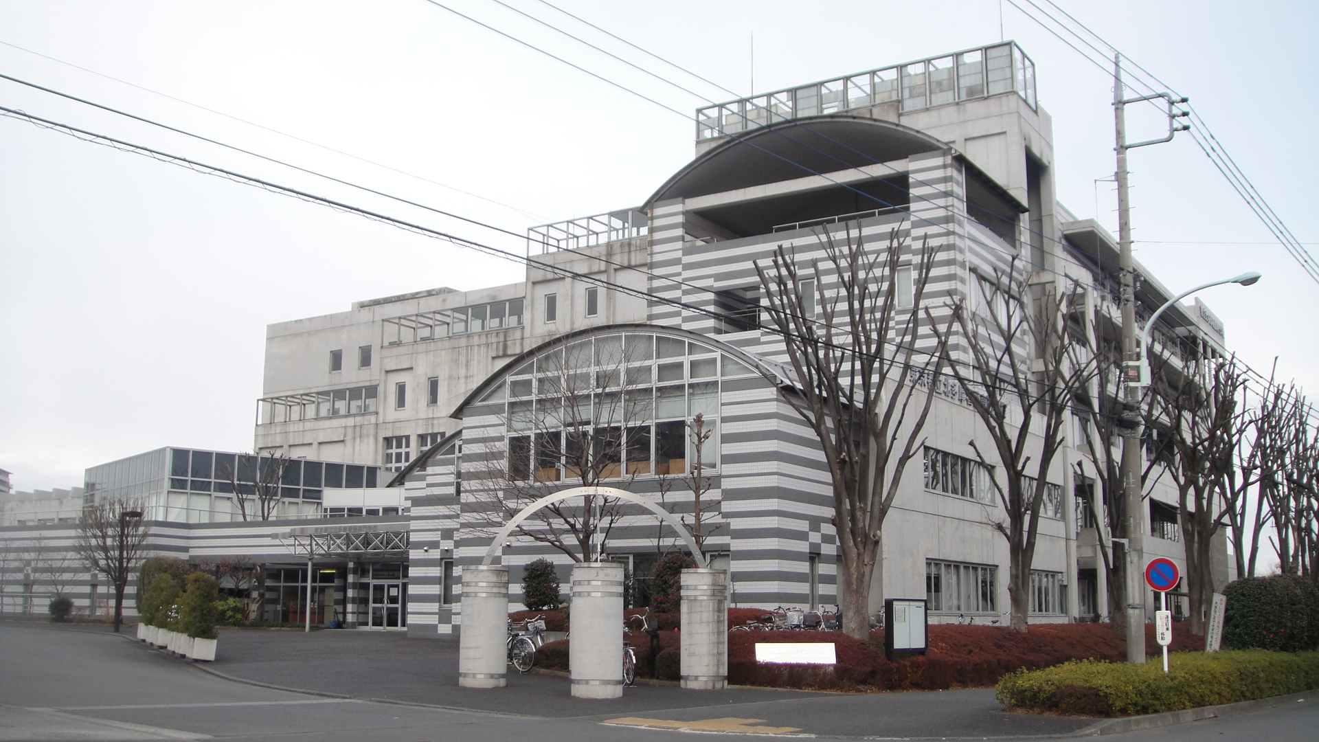 東京都東大和市にある東京都立北多摩看護専門学校